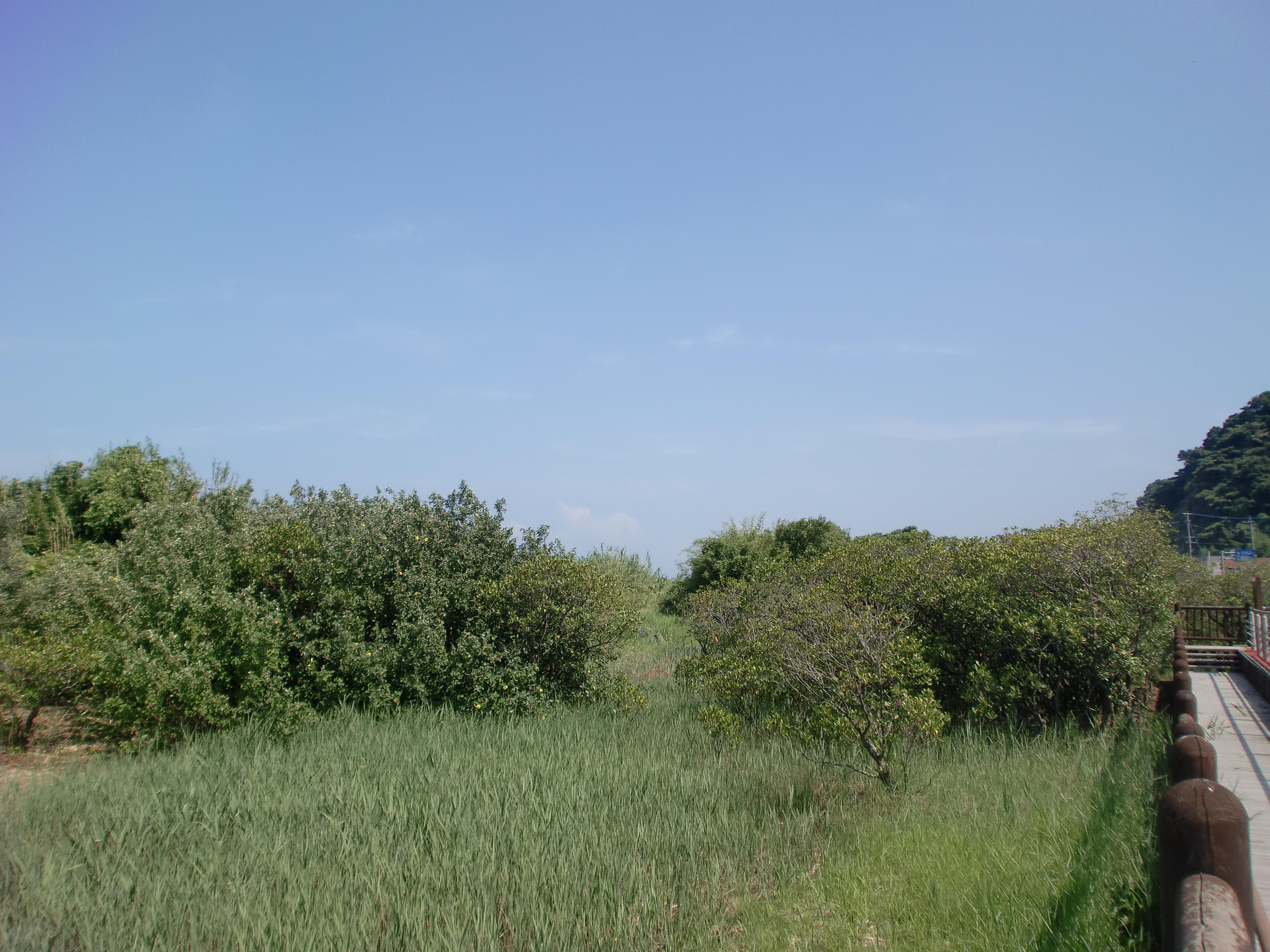 鹿児島県・喜入のリュウキュウコウガイ産地。メヒルギの定着したマングローブの北限にあたり、国の特別天然記念物。